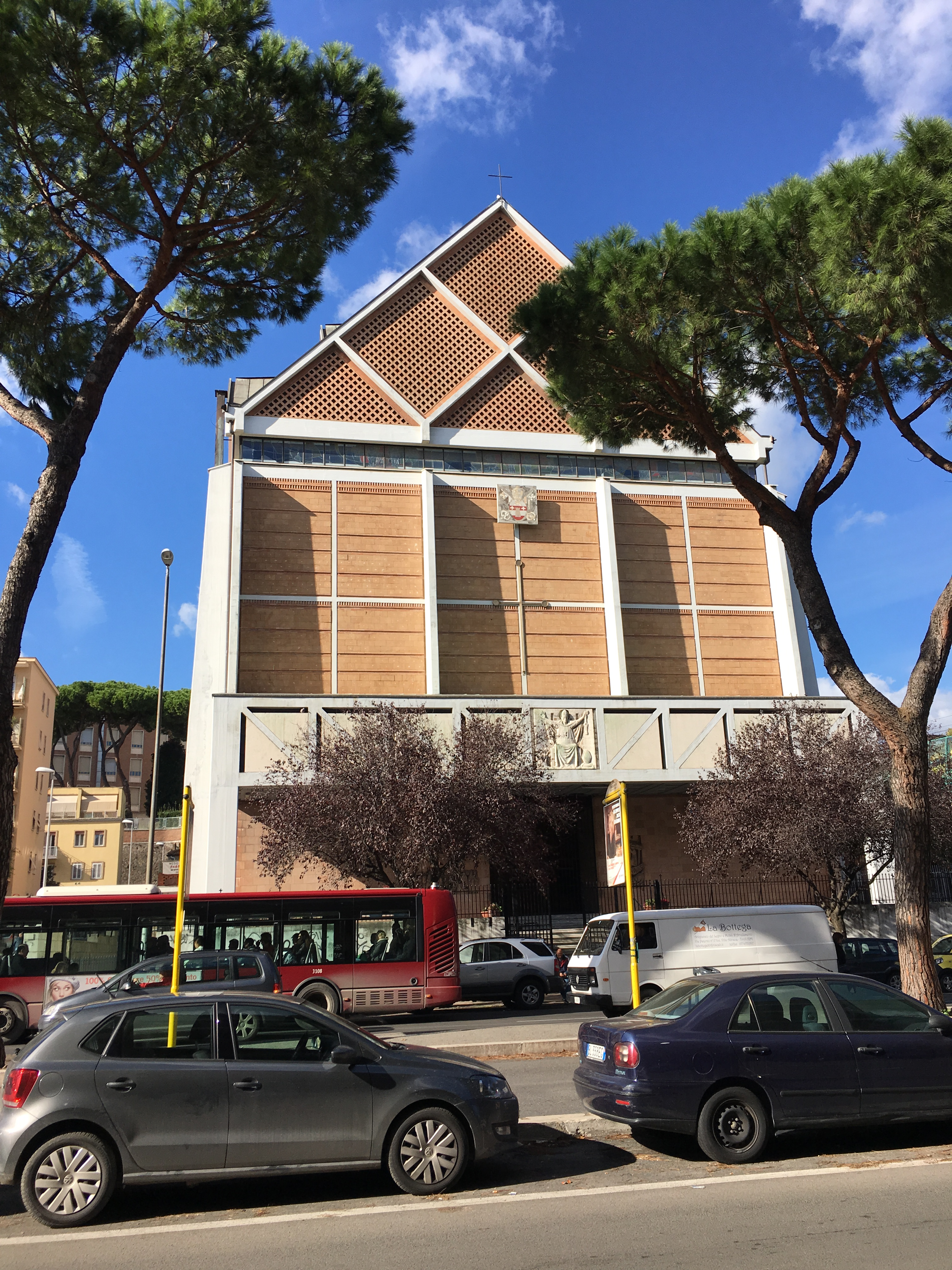 Facciata della chiesa di San Gregorio VII